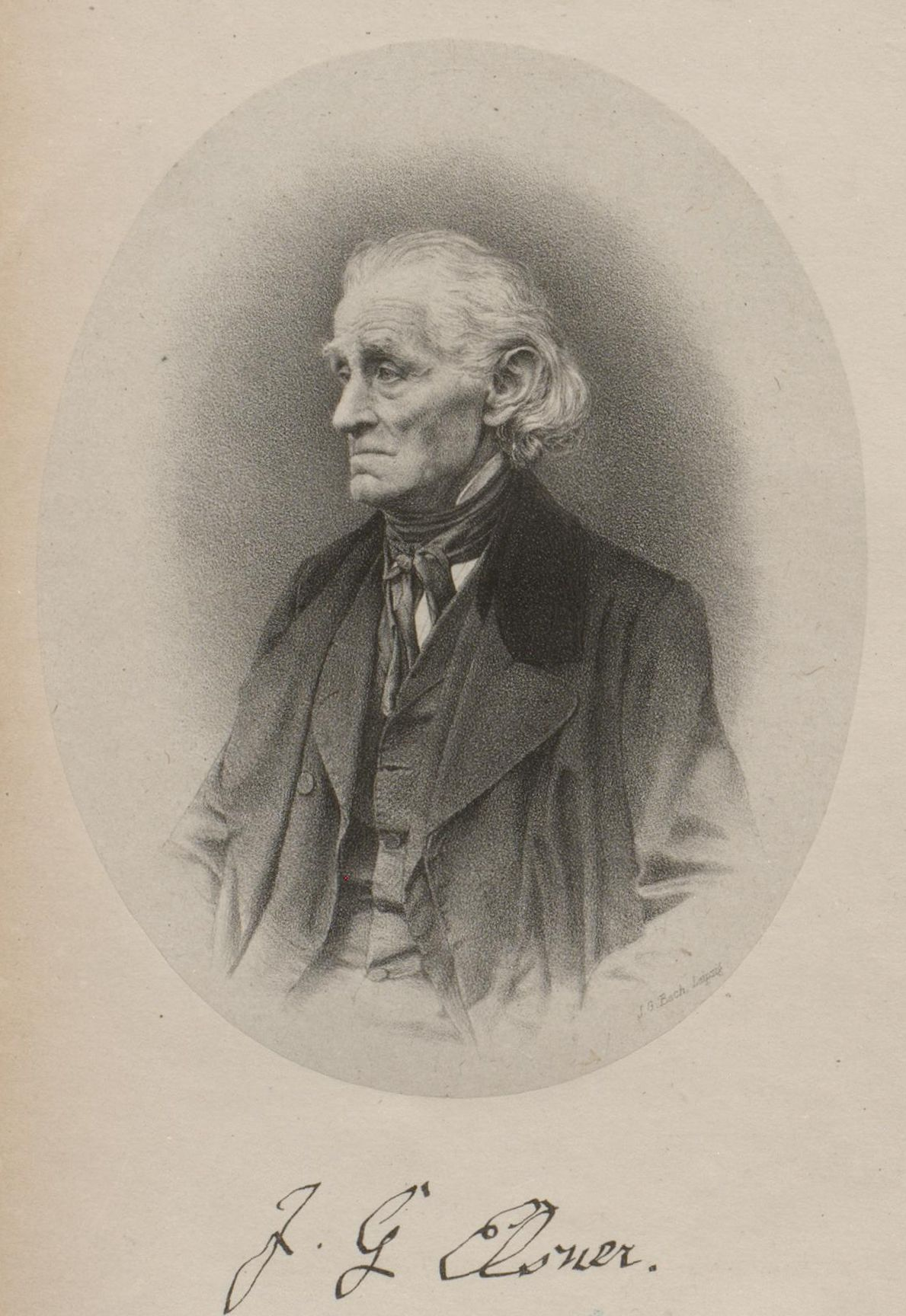 Porträt und Unterschrift von Johann Georg Elsner